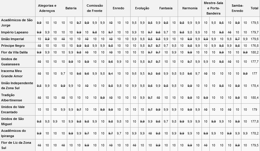 Resultados do Carnaval de São Paulo - 2015 - 2 UESP